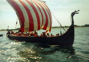 Vikingeskibet Imme Gram af Tønder Skibslag